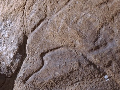 Cuva del moro, Arte paleolítica, Arte paleolítico